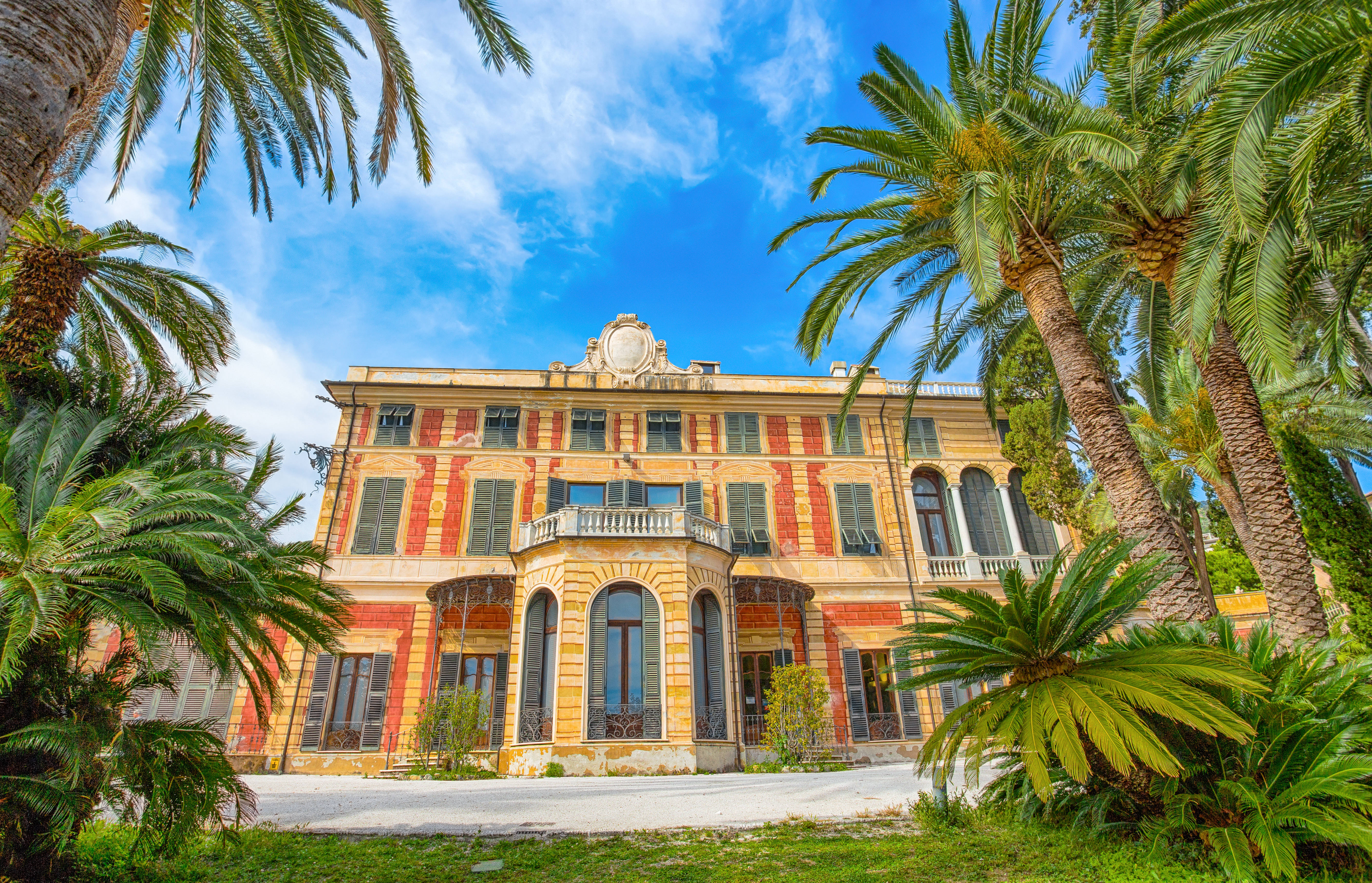 villa Gropallo Serra This is a photo of a monument which is part of cultural heritage of Italy.